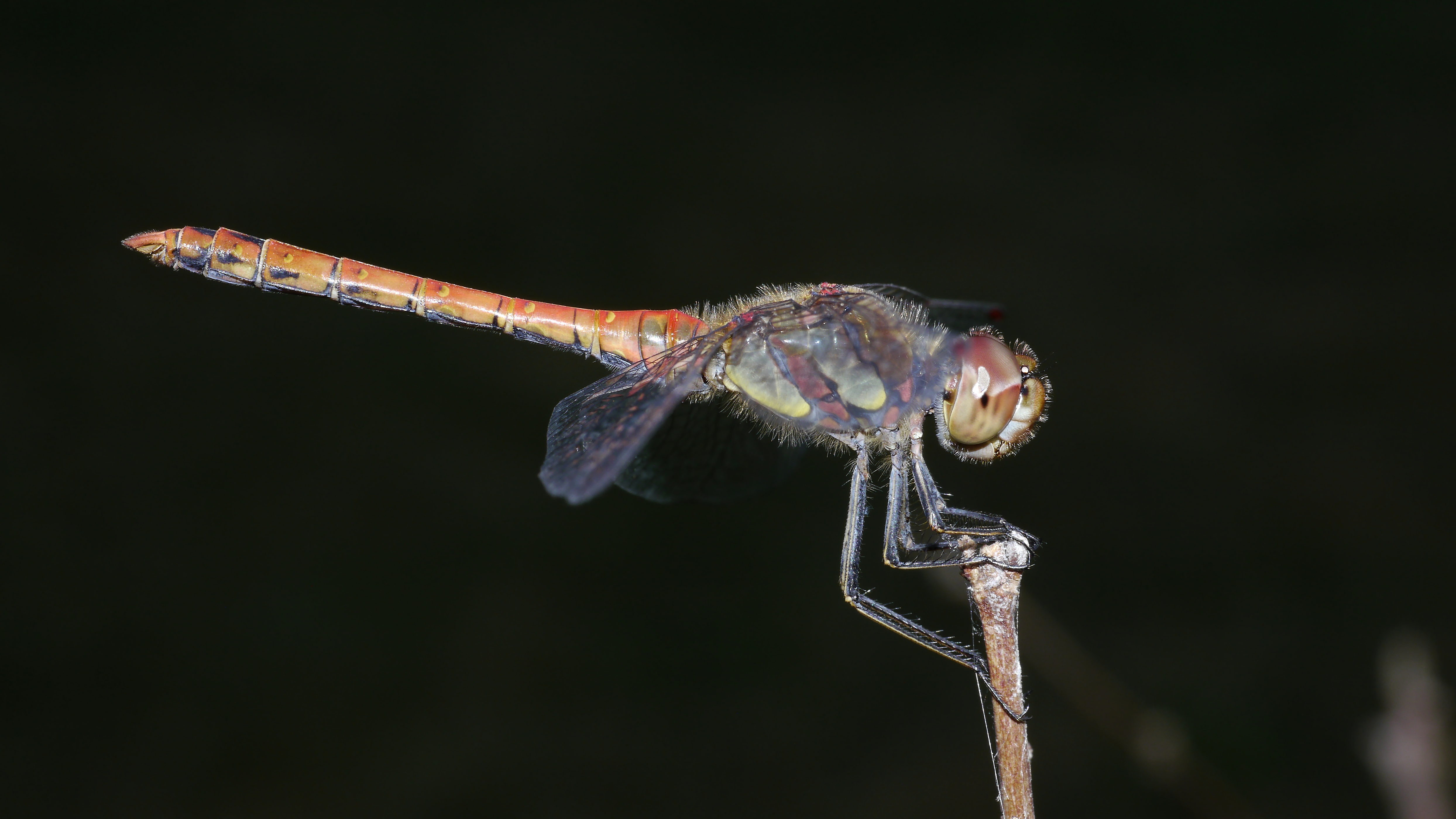 Große Heidelibelle, Männchen - Sympetrum striolatum. Aufgenommen in Mannheim am Vogelstangsee, Baden-Württemberg, Deutschland.